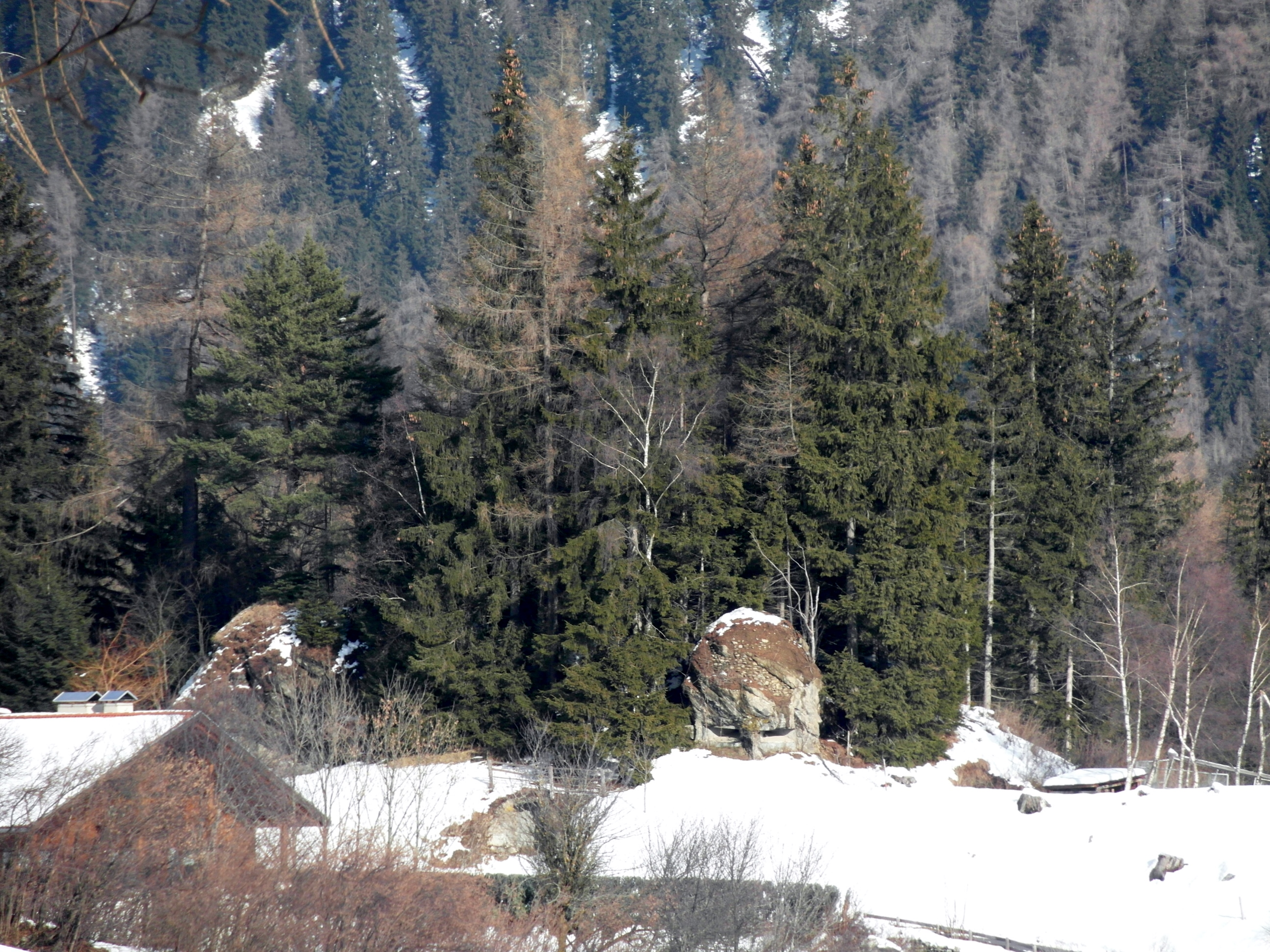 Opera 16 Tenne